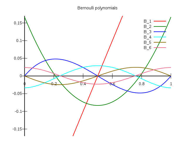 Bernoulli polynomials